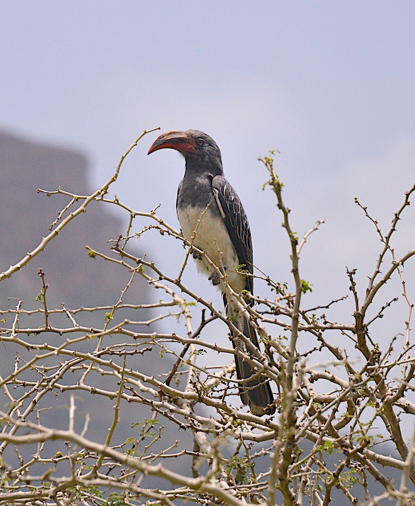 Ethiopia